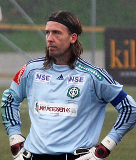 Bo Andersen, Player of Stavanger Idrettsforening